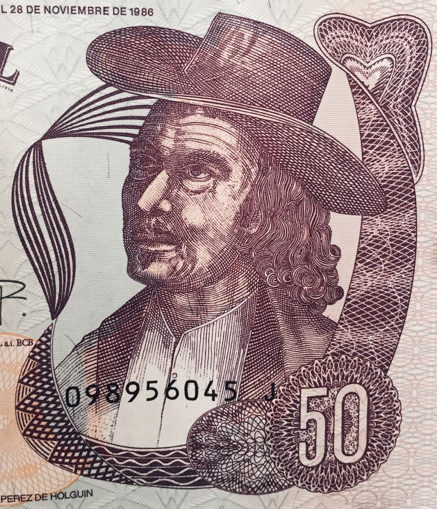 Foto de Melchor Pérez de Holguín en el Billete de 50 Bolivianos.